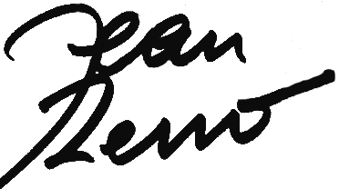 Autographe de l'acteur français Jean Reno